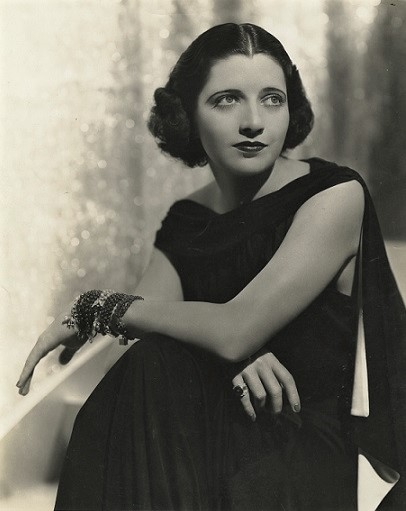 Kay Francis